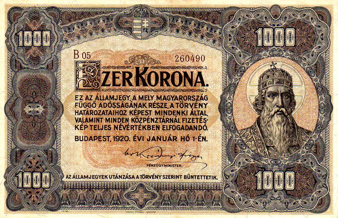 1000 Hungarian korona (1920) by Orell Füssli (Zürich)- obverse